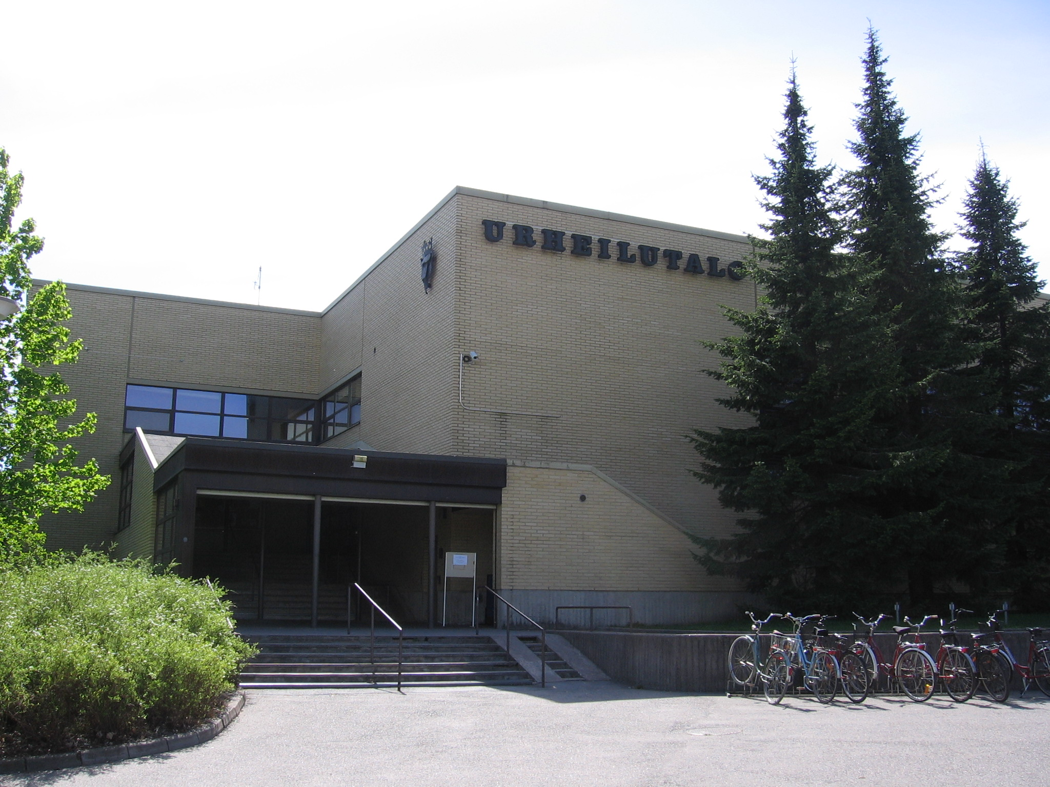 Porin urheilutalo